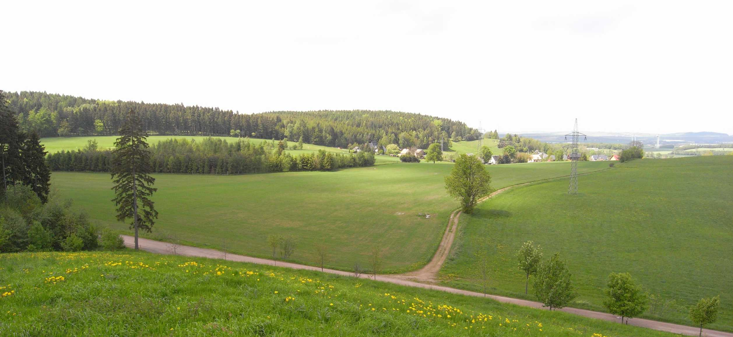 Lockwitzbach in Oberfrauendorf, Quellgebiet ist das Wäldchen links in Bildmitte (Sachsen, Deutschland)